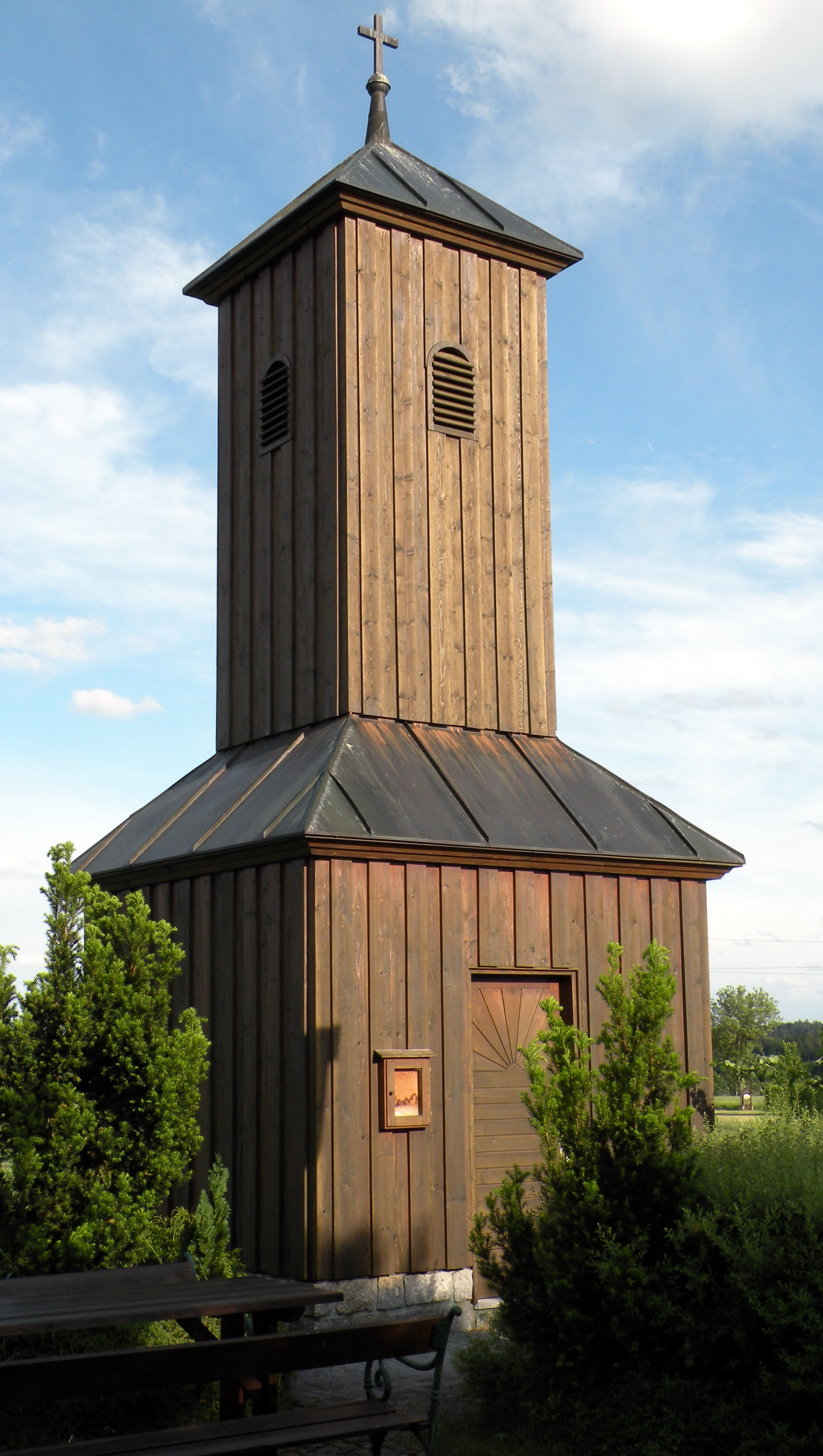 Kirche in Neuthaures in der Stadtgemeinde Heidenreichstein